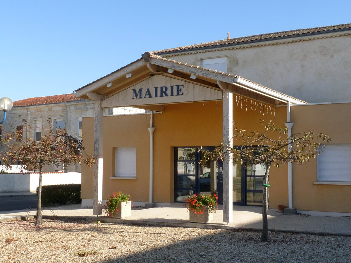 entrée de la mairie de Queyrac, Gironde, France